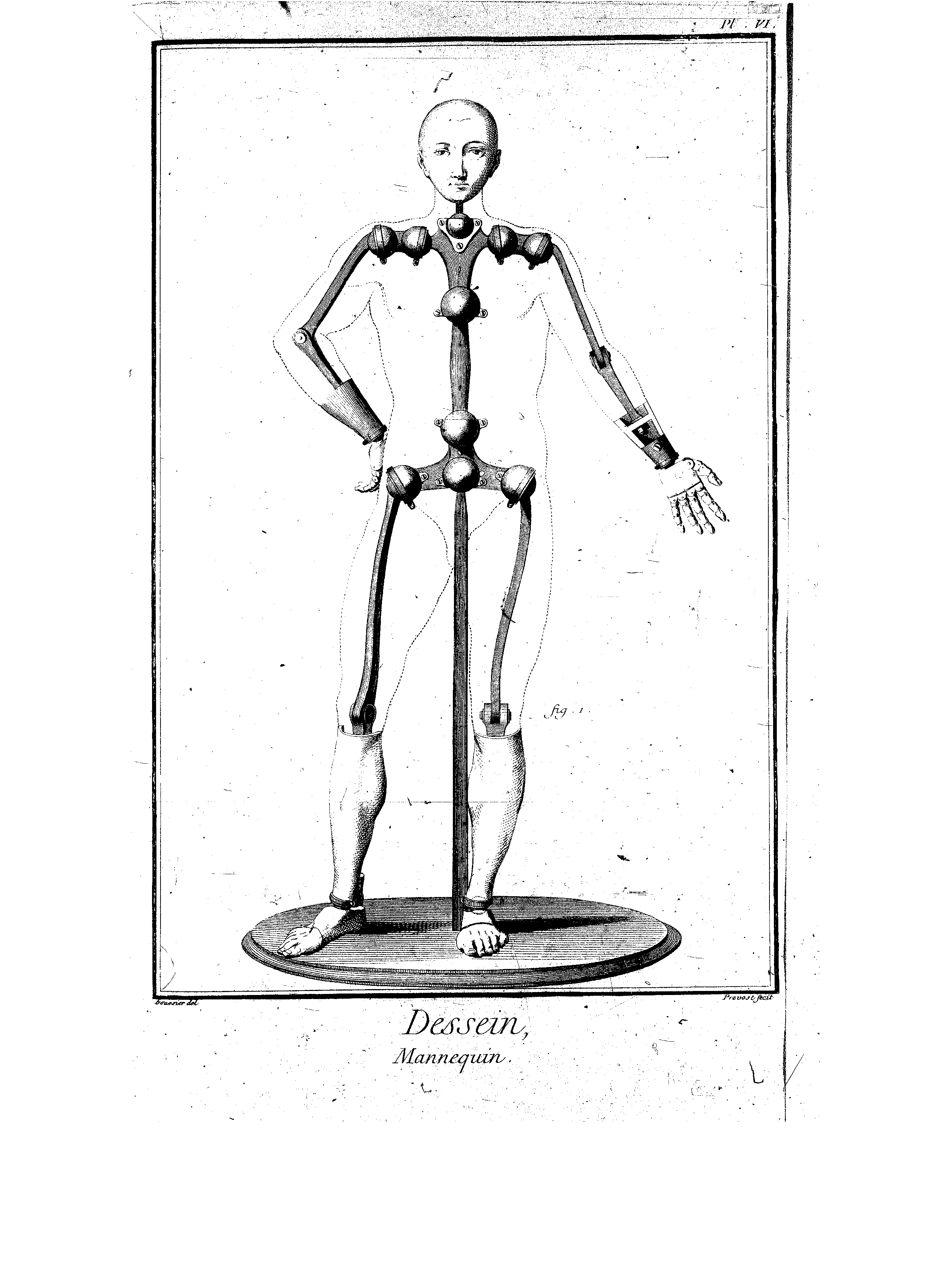 Planches de l'Encyclopédie de Diderot et d'Alembert, volume 2b